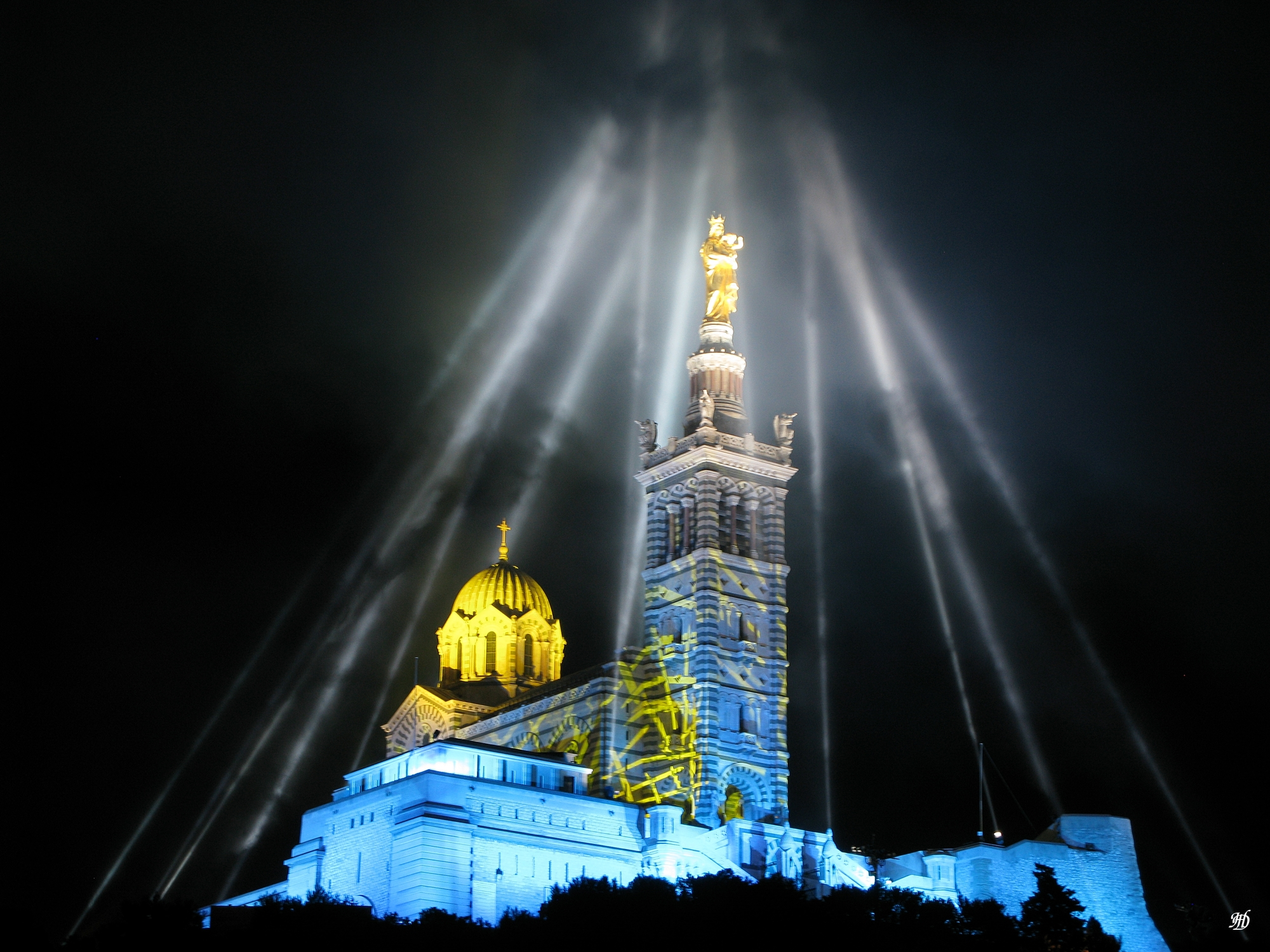 Marseille Capitale Européenne de la Culture 2013, ouverture du 12 janvier 2013 : illuminations à Notre-Dame de la Garde.